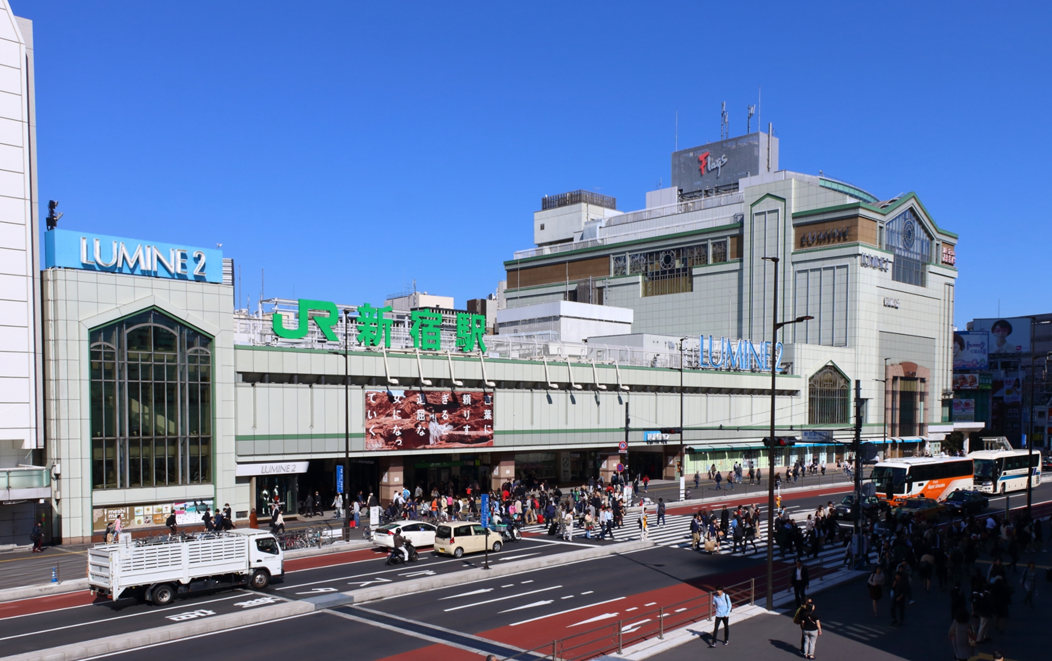 新宿駅南口